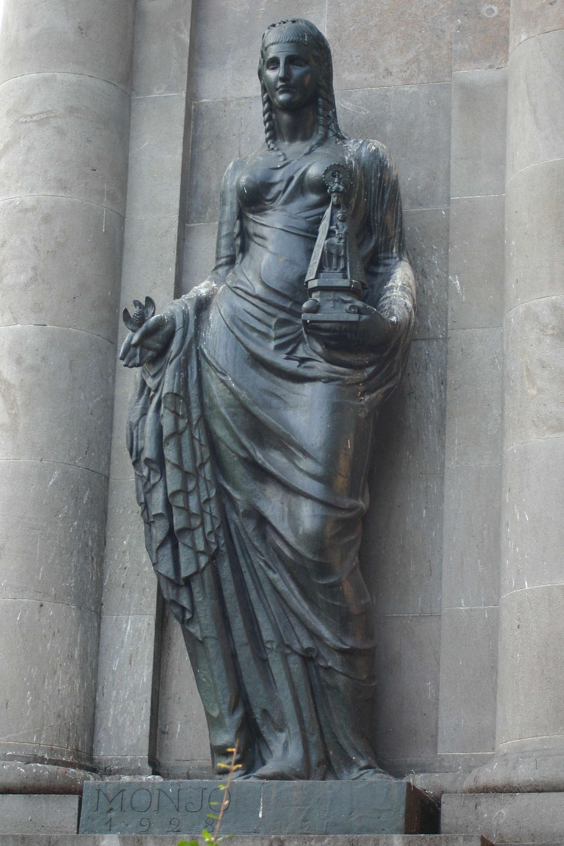 2016-2. Dona amb imatge de la Mare de Déu. Plaza Catalunya, Barcelona (Spain)